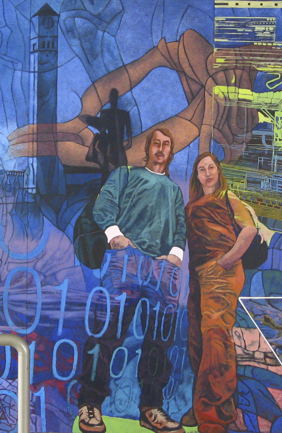 Mural "Educación: pasado, presente y futuro" (2009) de Marco Antonio Hernández Albarrán. Detalle del interior. Concepción, Chile. Agosto de 2012.